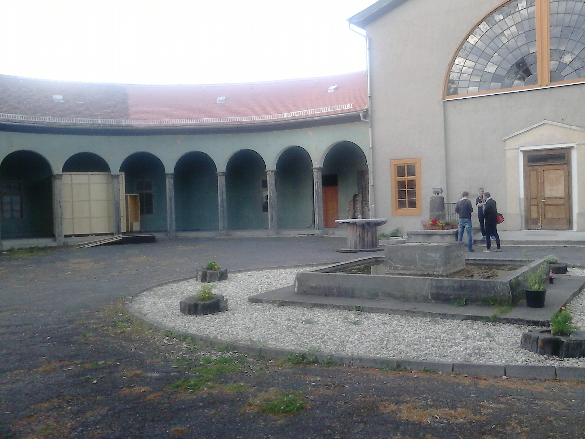 Schießhaus Arkadengang rechte Seite